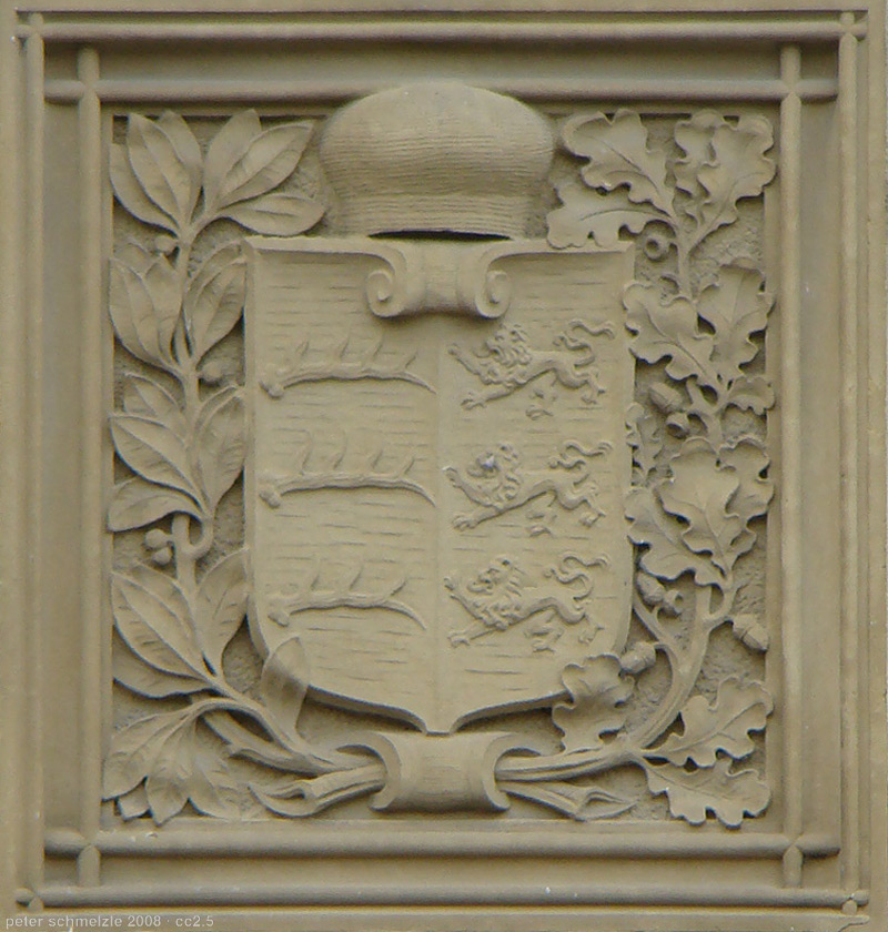 Württembergisches Wappen am 1902 erbauten Dienstgebäude der Eisenbahn in der Bahnhofstraße 20 in Heilbronn